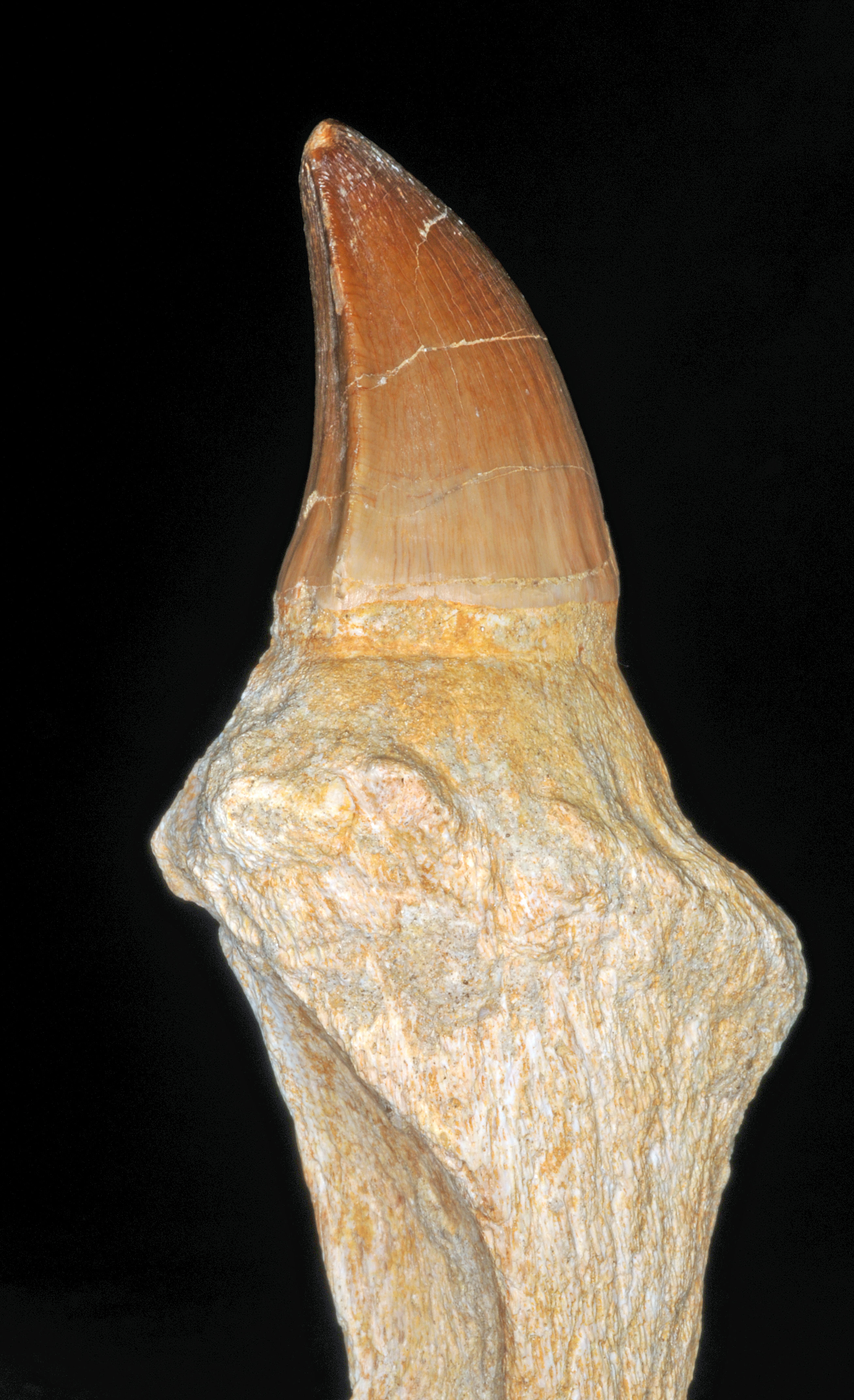 dent de Mosasaurus beaugei, montrant la cavité de la dent de remplacement